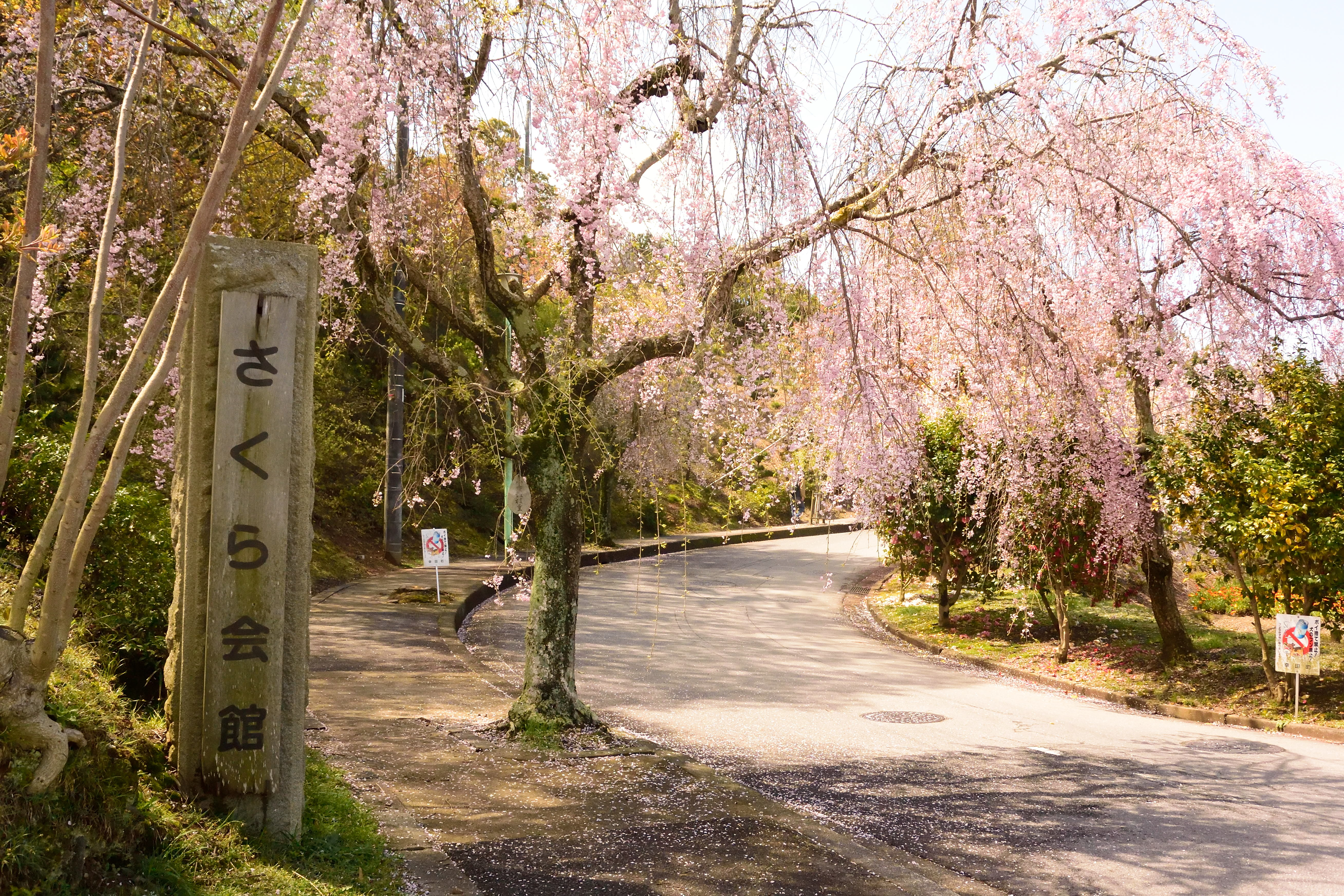 幸田文化広場入口